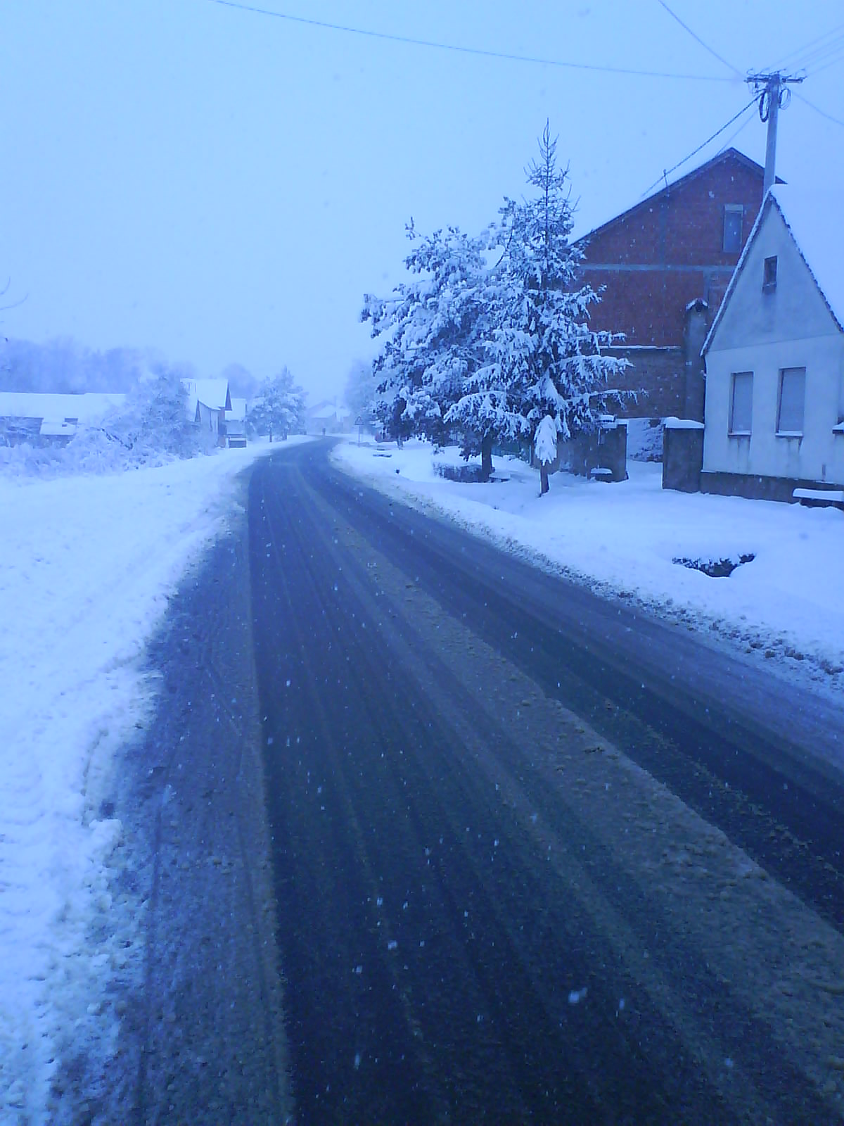 Snijeg u Banovcima prosinac 2009.